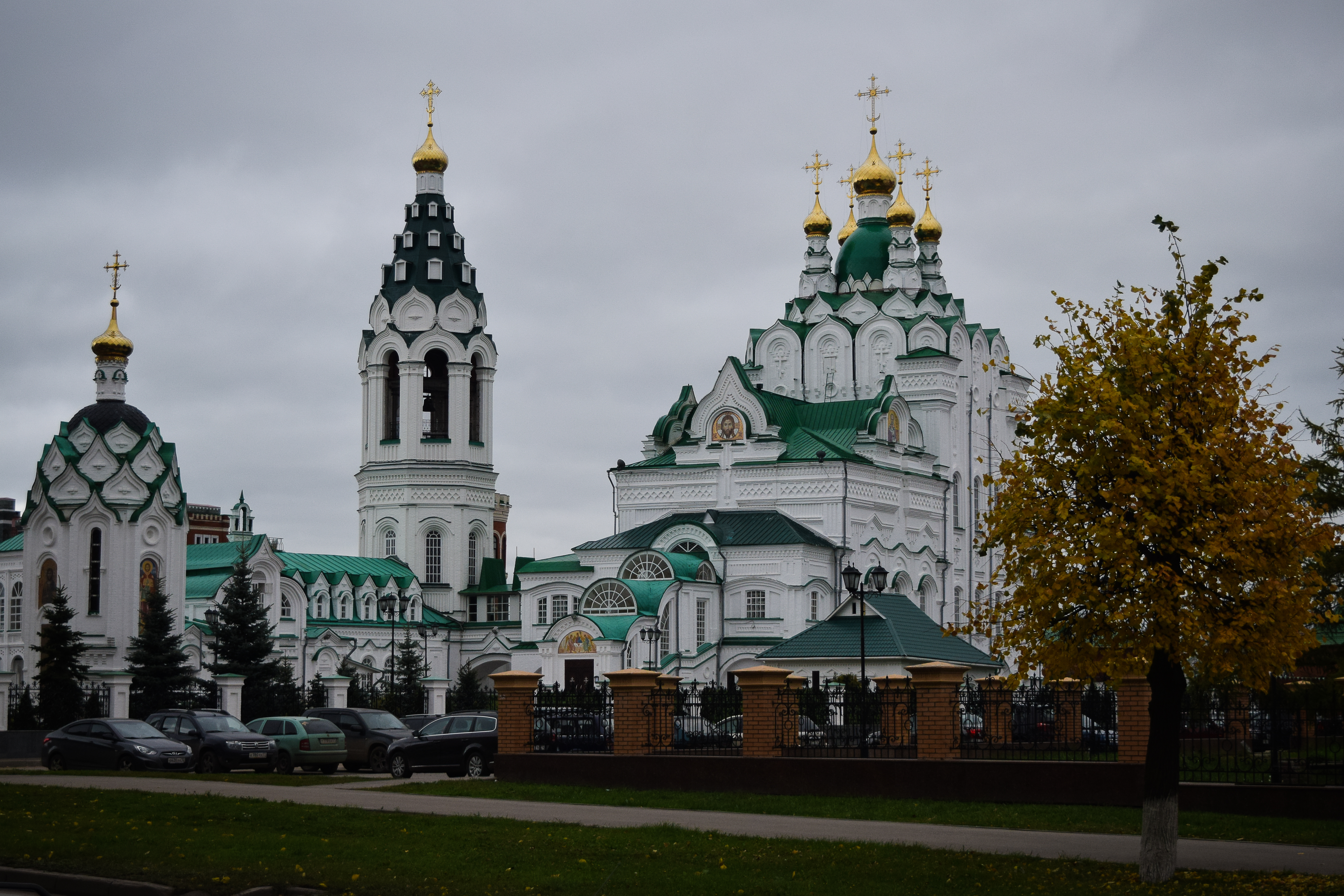 Троицкая церковь Троицкого девичьего монастыря (для вдов стрелецких жонок): ул. Вознесенская 53 (Анисимовская ул.), Йошкар-Ола, Марий Эл